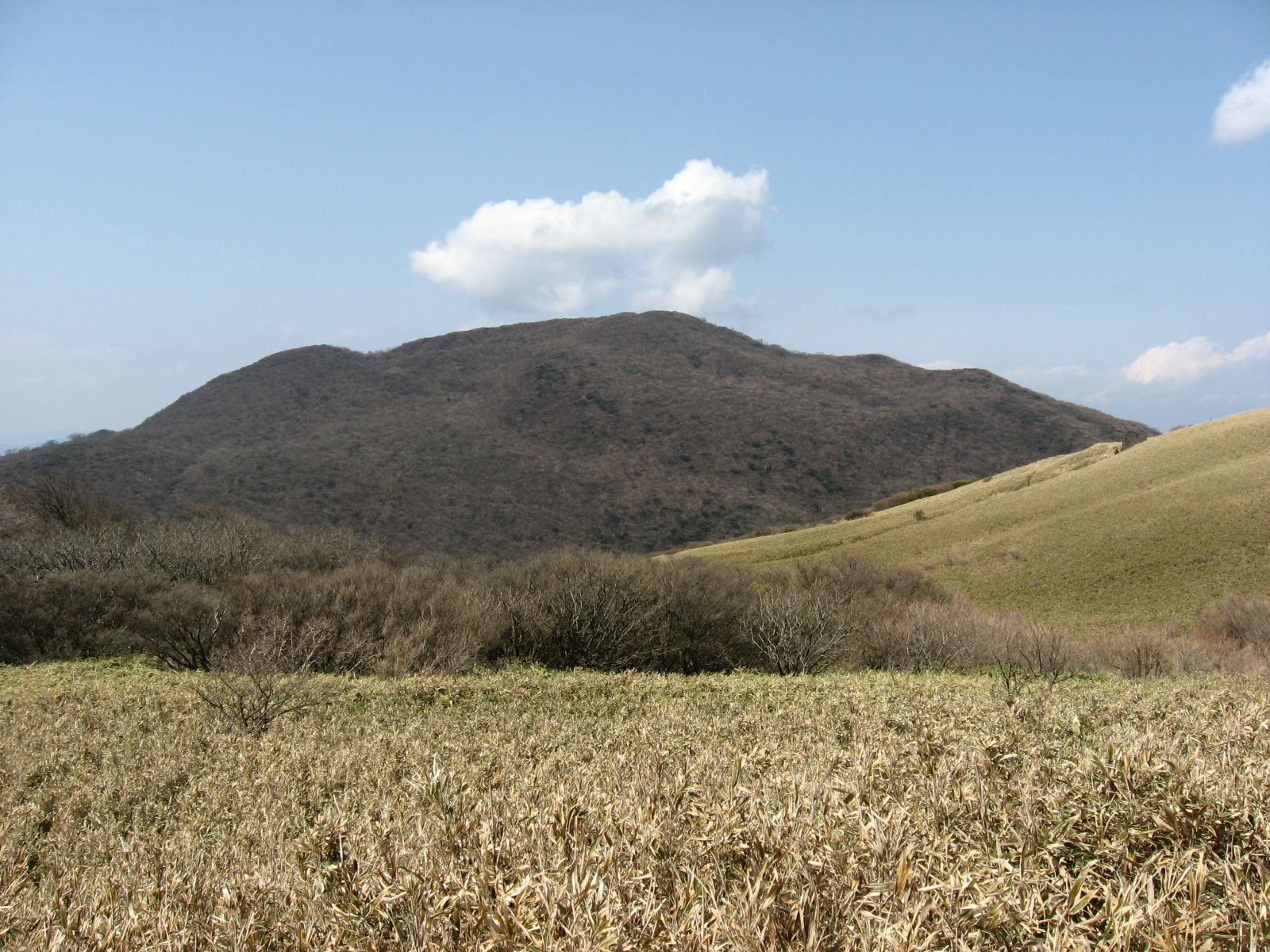 箱根駒ヶ岳より神山